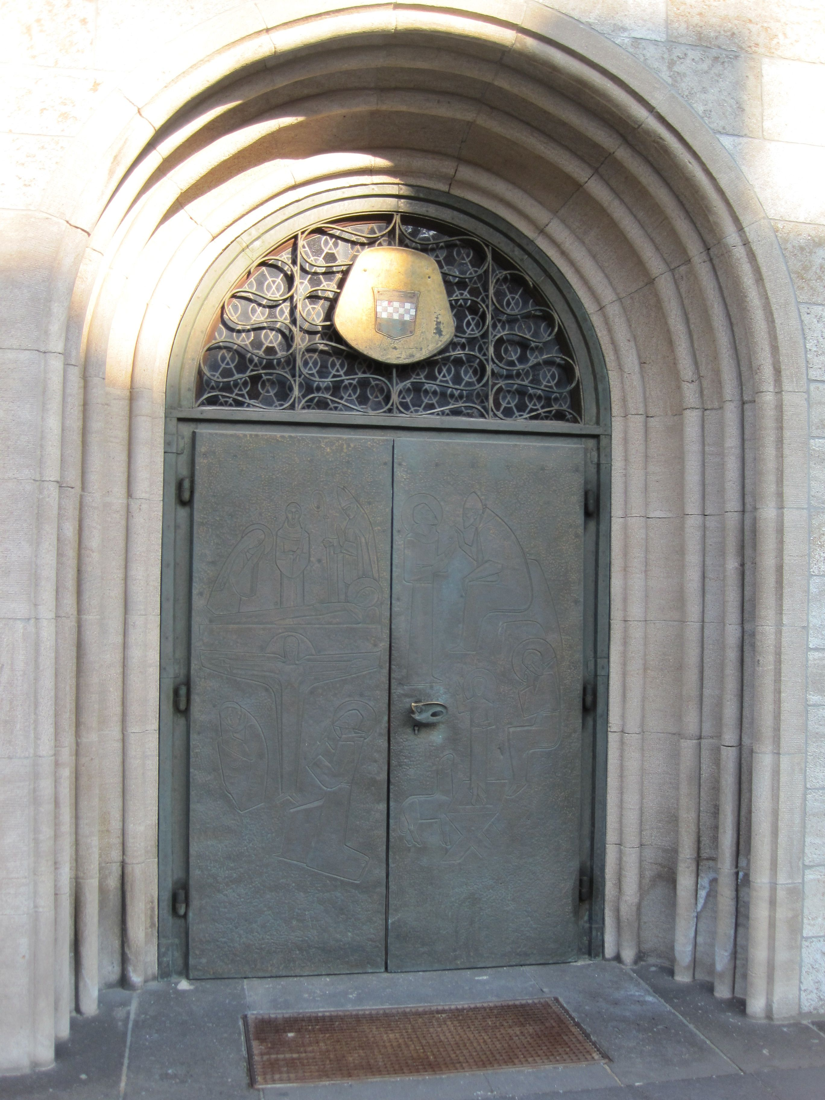 Das Foto zeigt das rechte Eingangsportal der St. Agneskirche in Hamm.